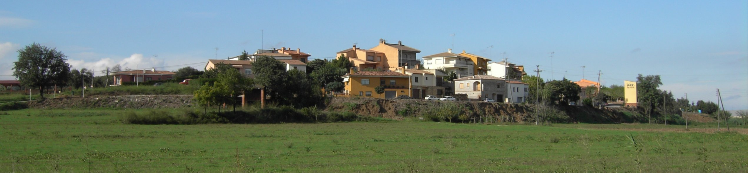 Puig Ventós, residential district of Cruïlles, Catalonia